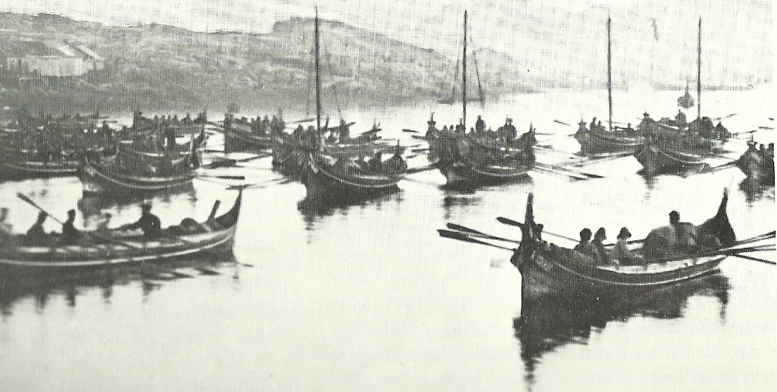 Utror 1860